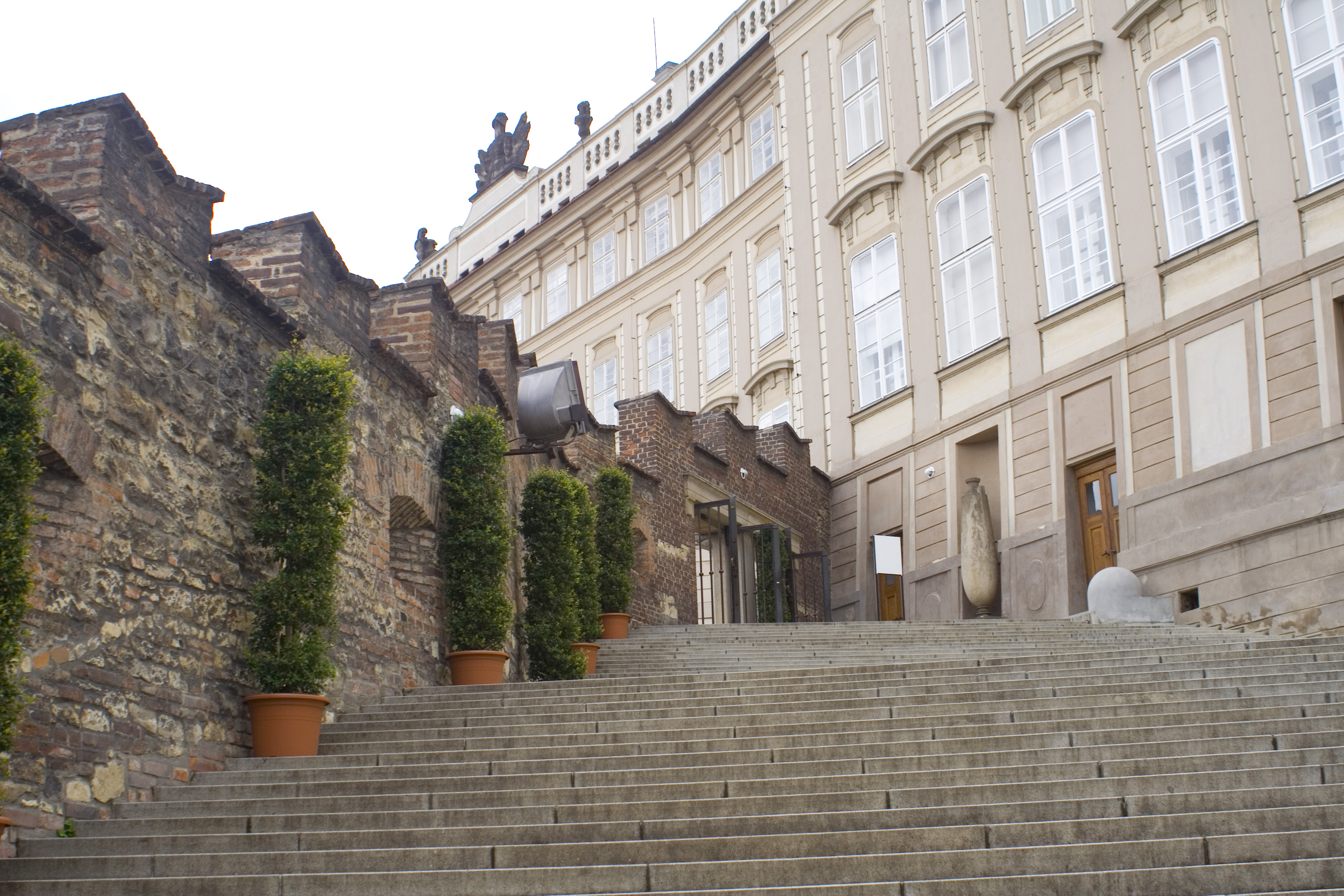 Pražský hrad, schody z Rajské zahrady a Nový královský palác